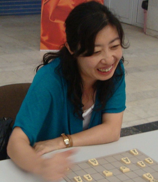 Nakai Hiroe at ESC/WOSC 2013 (Minsk)